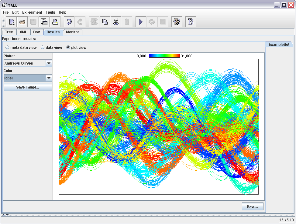 Screenshot der Data Mining Umgebung YALE